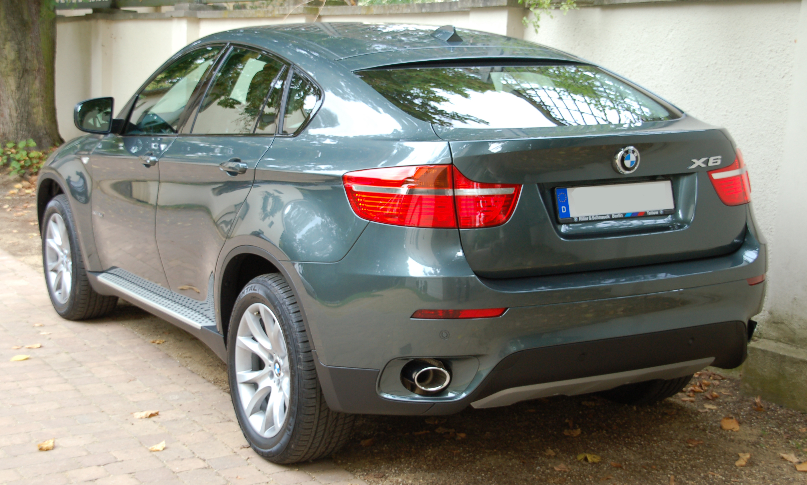 BMW X6